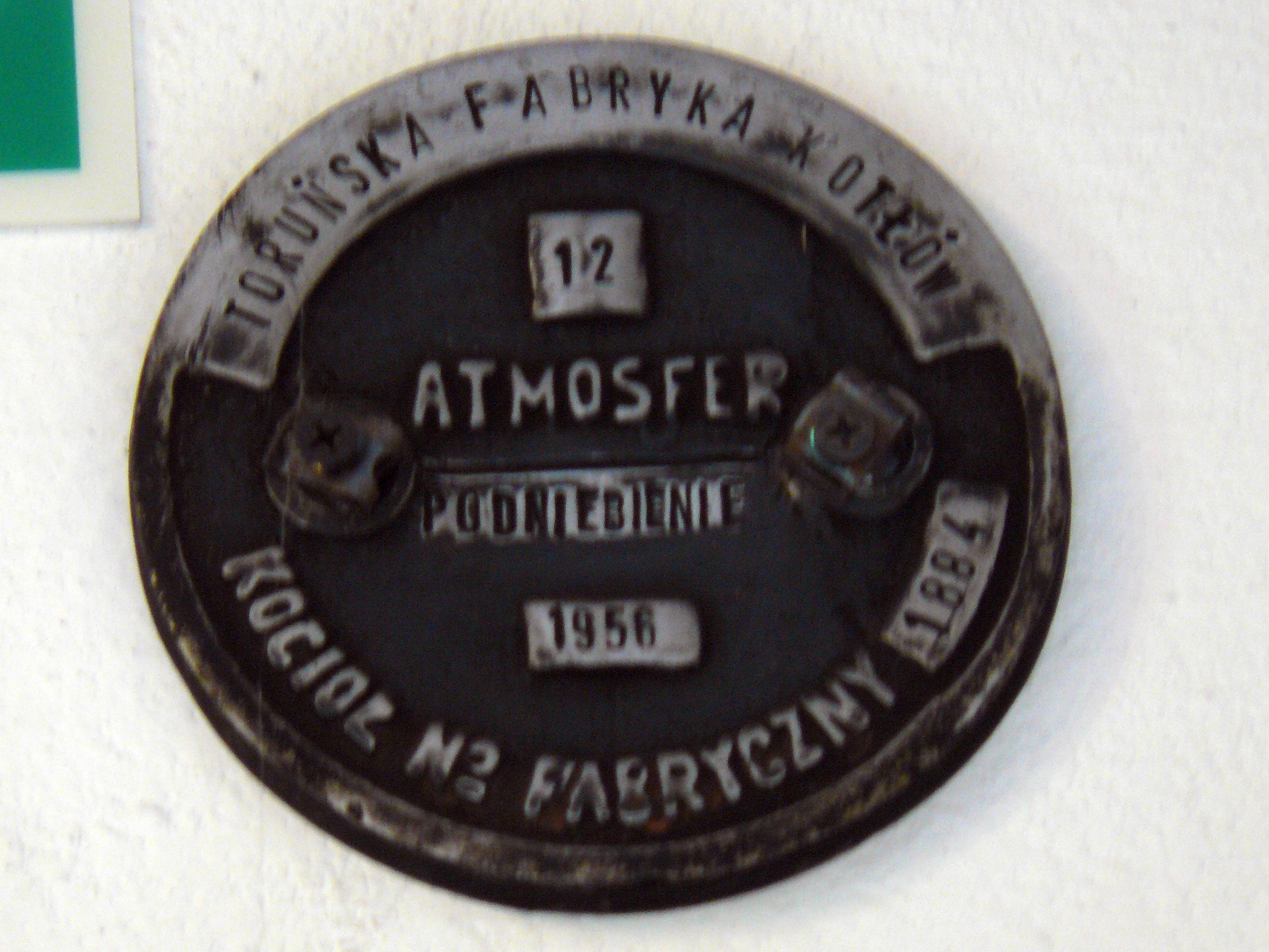 Tabliczka znamionowa Toruńskiej Fabryki Kotłów